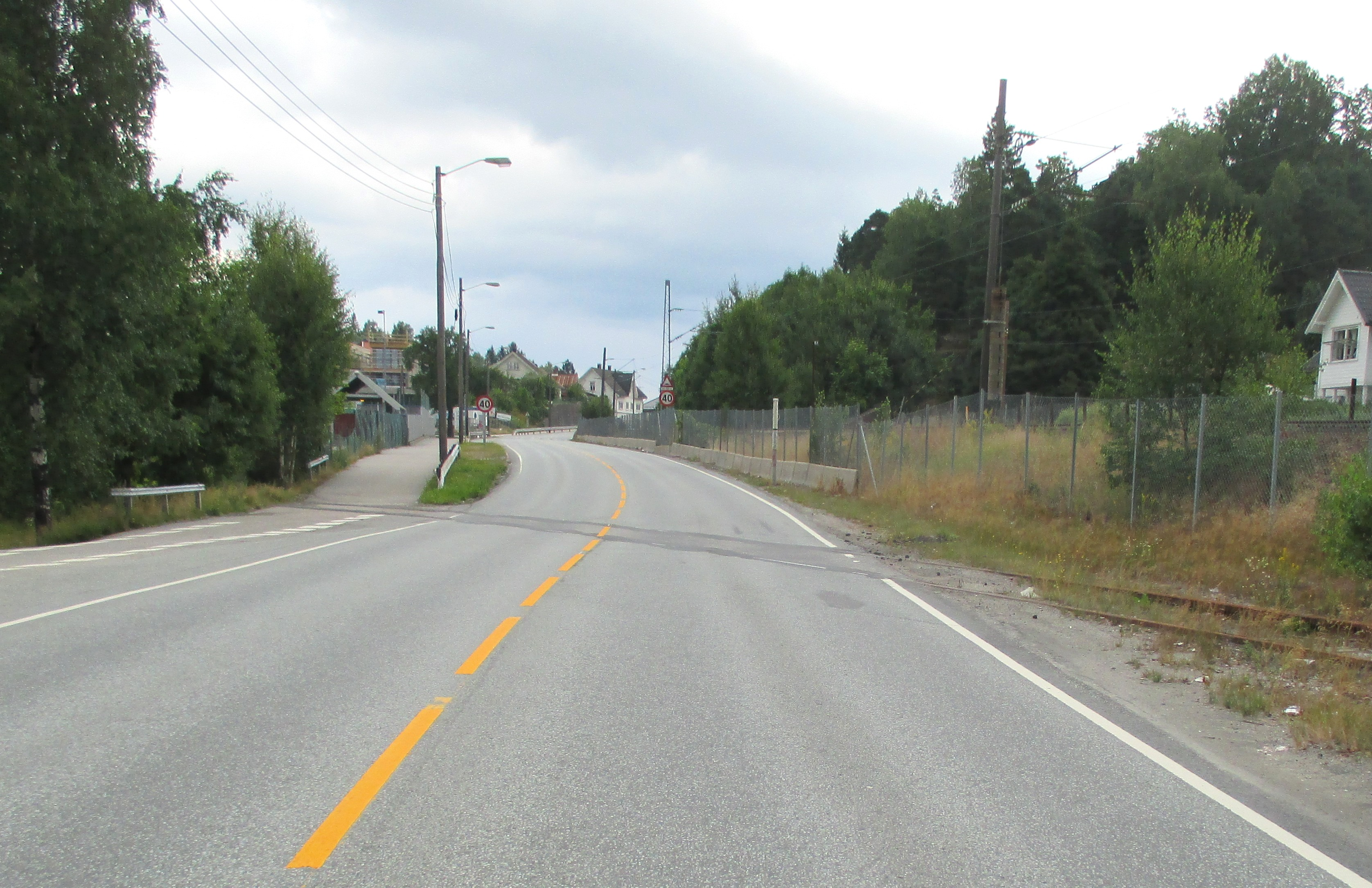 Nedlagt sidespor krysser fylkesveien nord for Vennesla stasjon.